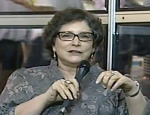 A jornalista e escritora Cora Rónai em entrevista ao Entrelivros, da TV Brasil.